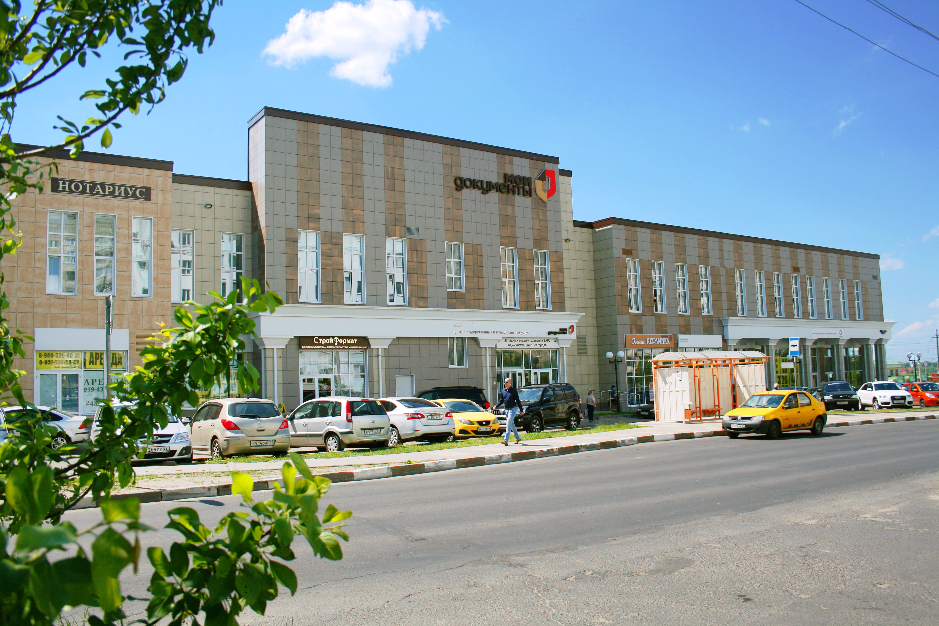 МФЦ по ул. Есенина. Многофункциональный центр предоставления государственных и муниципальных услуг города Белгорода